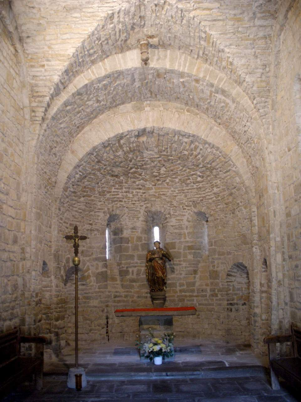 Iglesia de San Caprasio, en Santa Cruz de la Serós (Huesca)